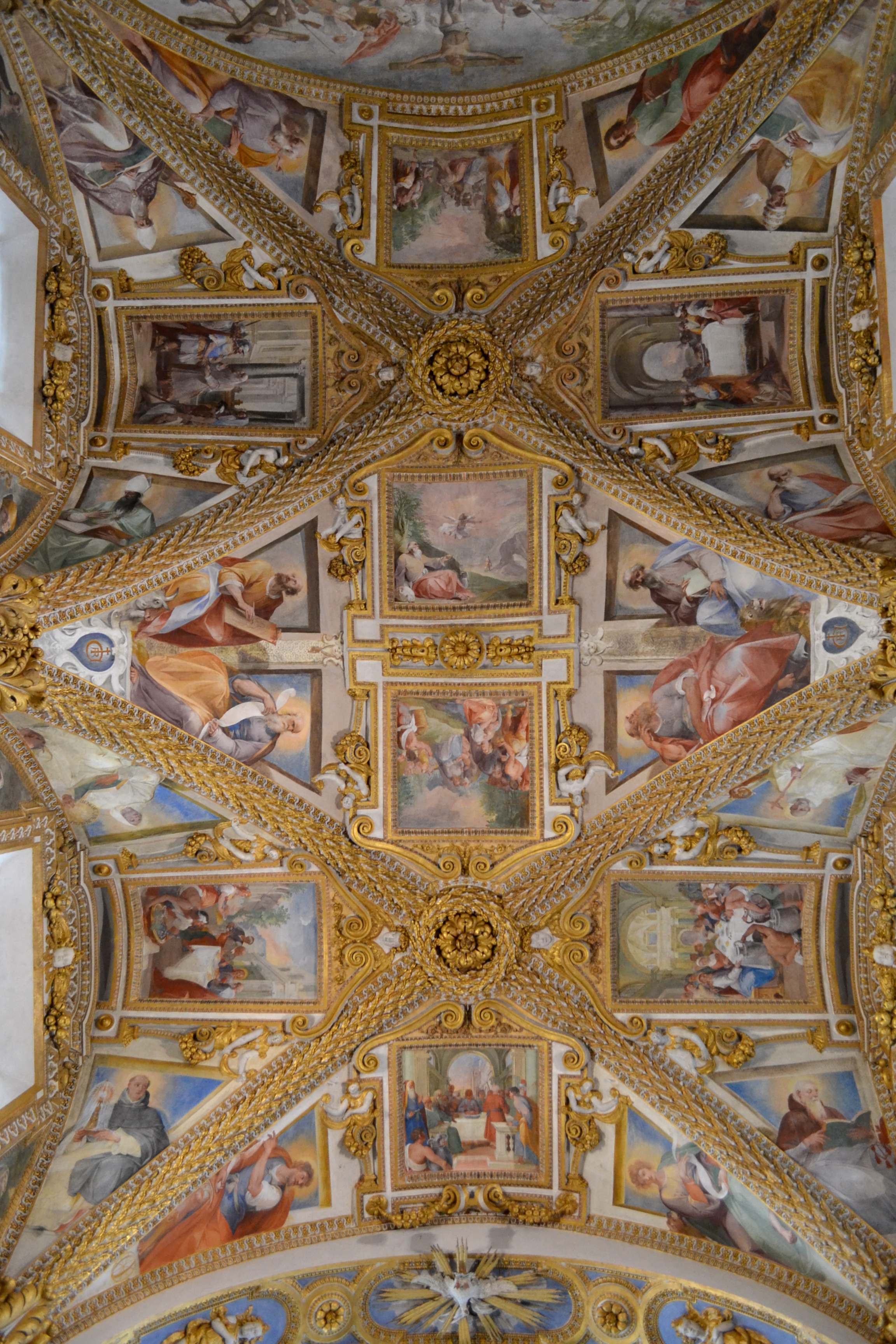 Certosa di San Martino di Napoli - Volta della zona absidale/coro (affreschi del Cavalier d'Arpino e Bernardino Cesari)